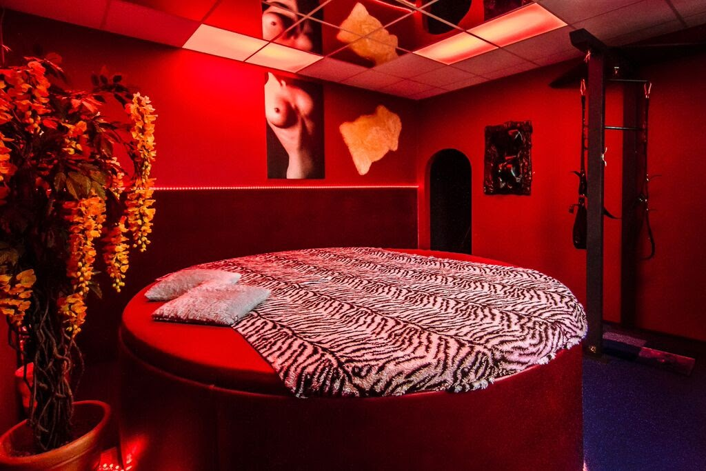 Rotes Zimmer mit rundem Bett und Liebesschaukel im Swingerclub PSP in Hamburg